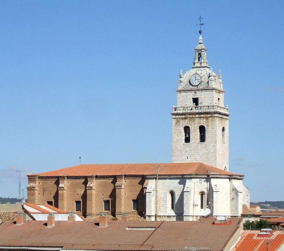 Iglesia de Santa María (Tordesillas, provincia de Valladolid).